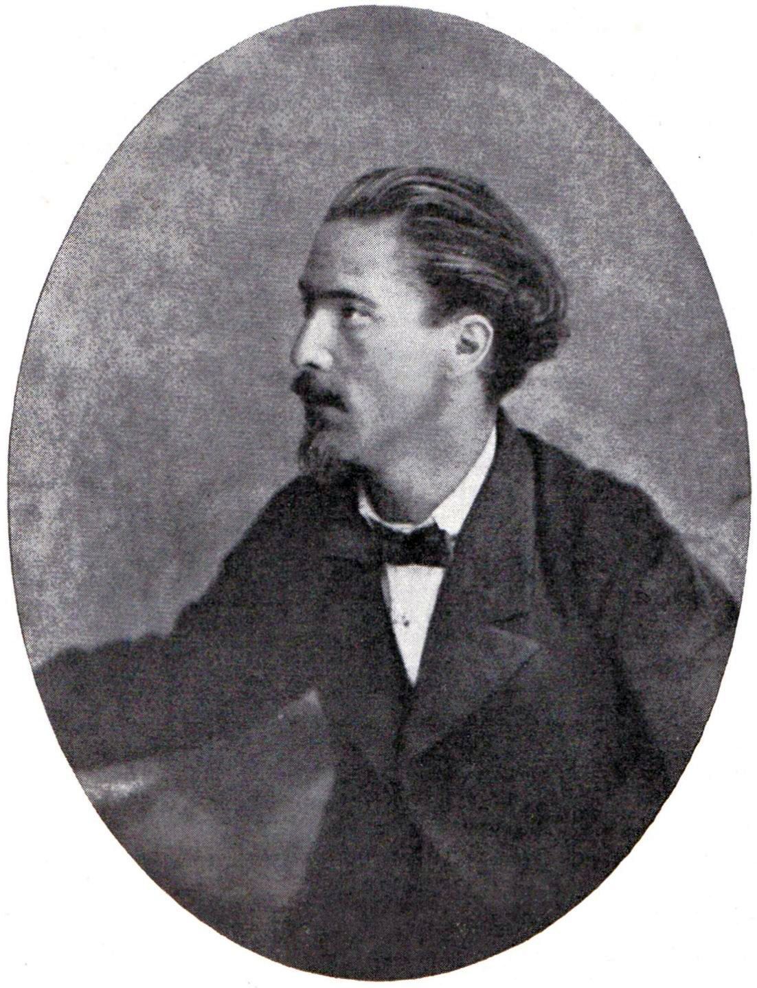 Gheorghe Grigorescu - Fratele pictorului Nicolae Grigorescu (foto)